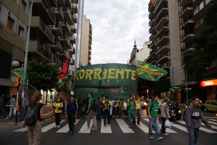 Movilización de la CEPA antes del Congreso de FUBA 2011